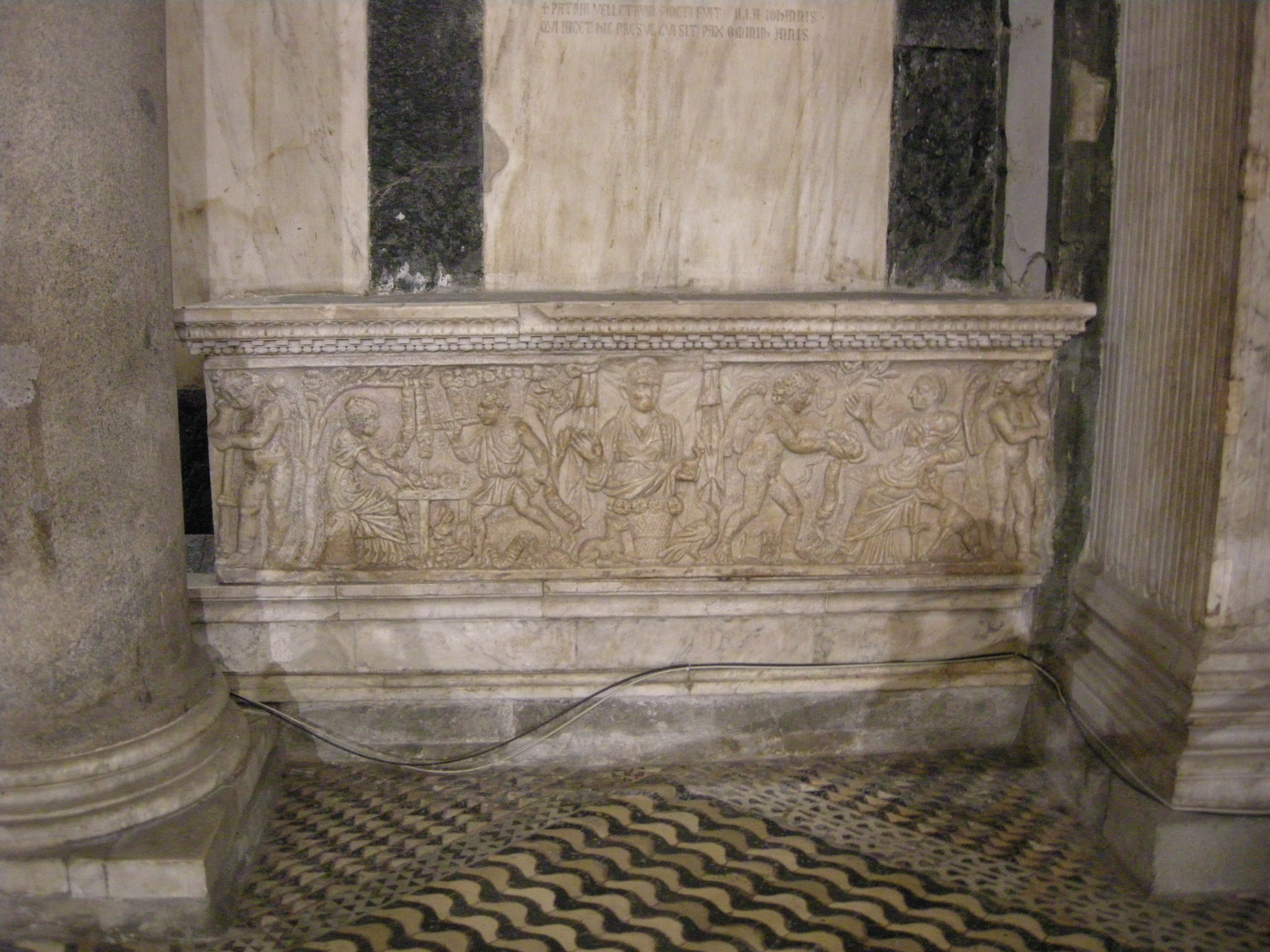 Sarcofago romano della fioraia, tomba di giovanni da velletri